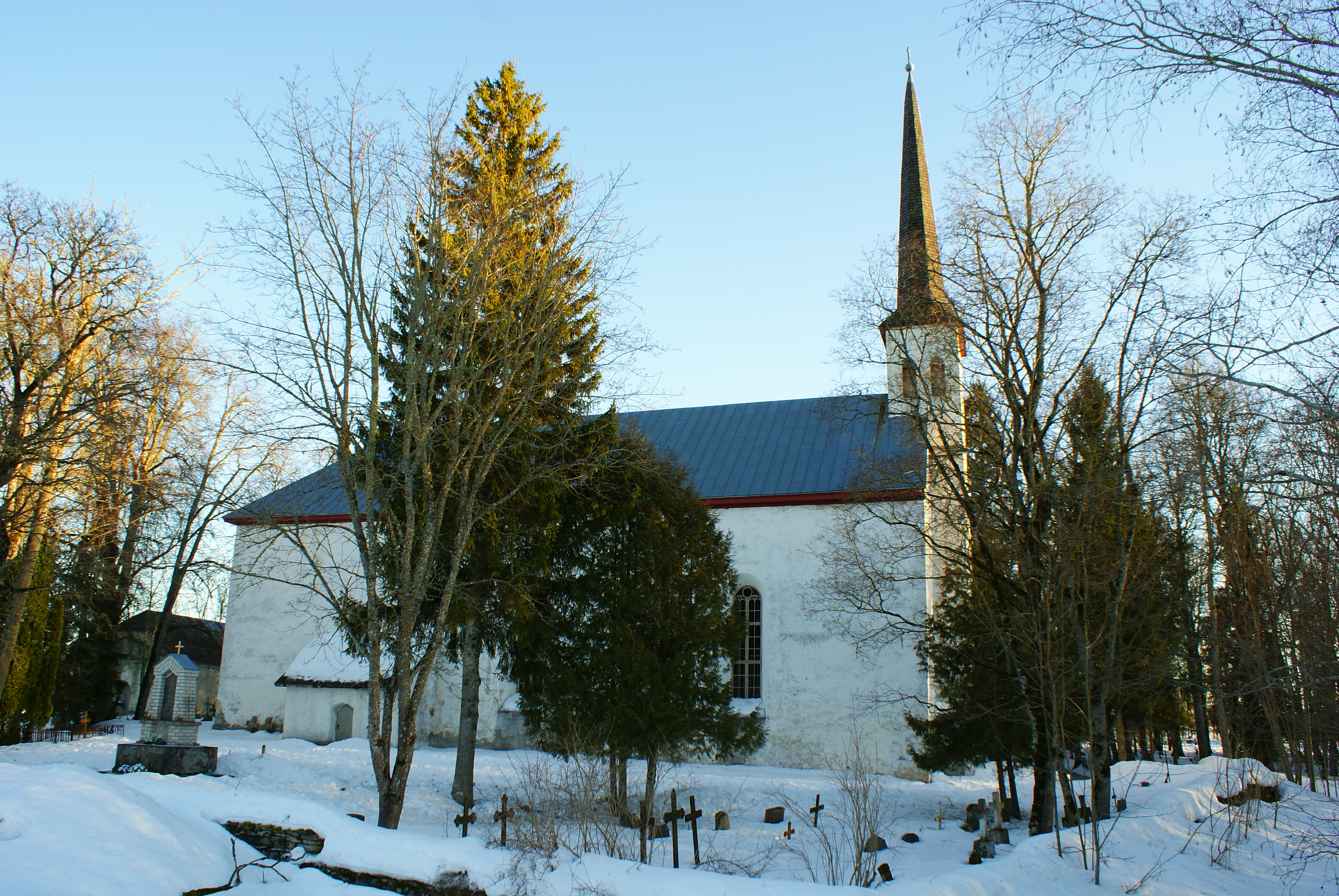 Martna kirik